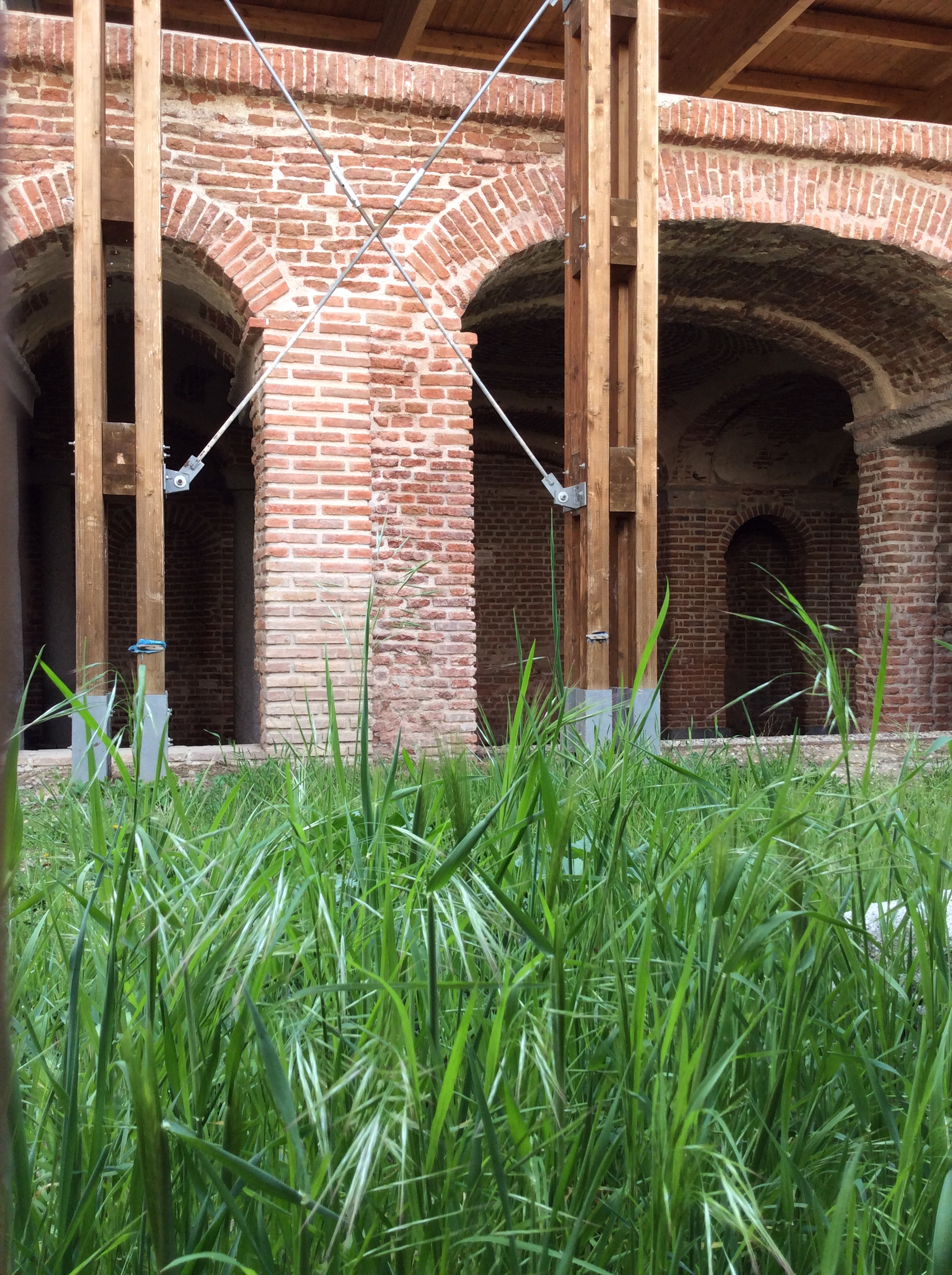 Una de las entradas a la Galería de las Grutas, un pabellón recreativo y paisajístico, que el rey Felipe II hizo construir, en el siglo XVI, en el Jardín de El Reservado, en el antiguo Real Sitio de la Casa de Campo, en Madrid (España).